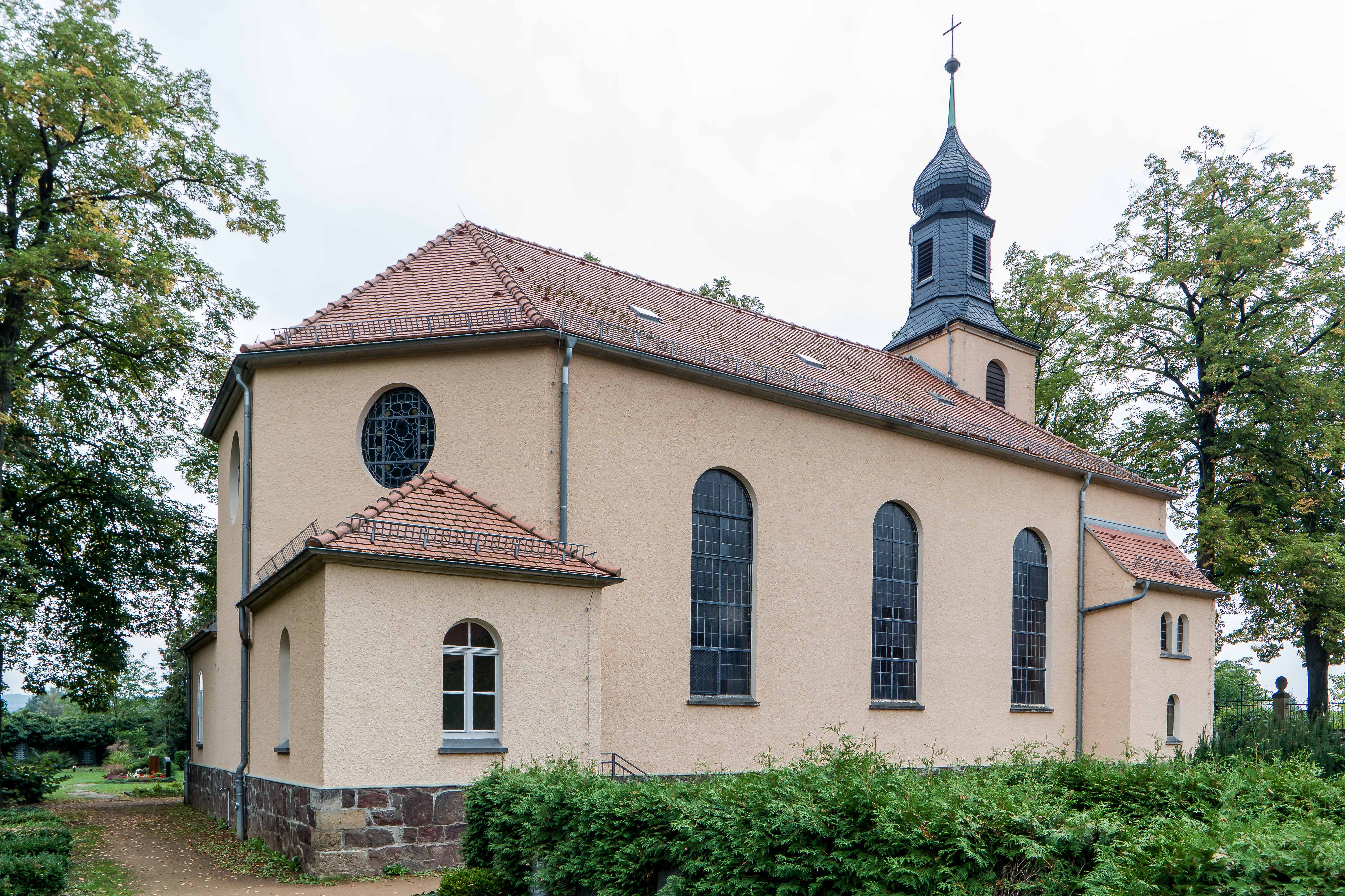 Johanneskapelle in Radebeul Ortsteil Naundorf